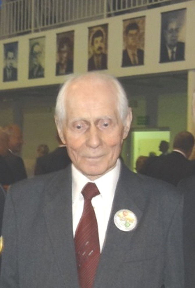 Przasnysz. Dyrektor Edward Lemanowicz